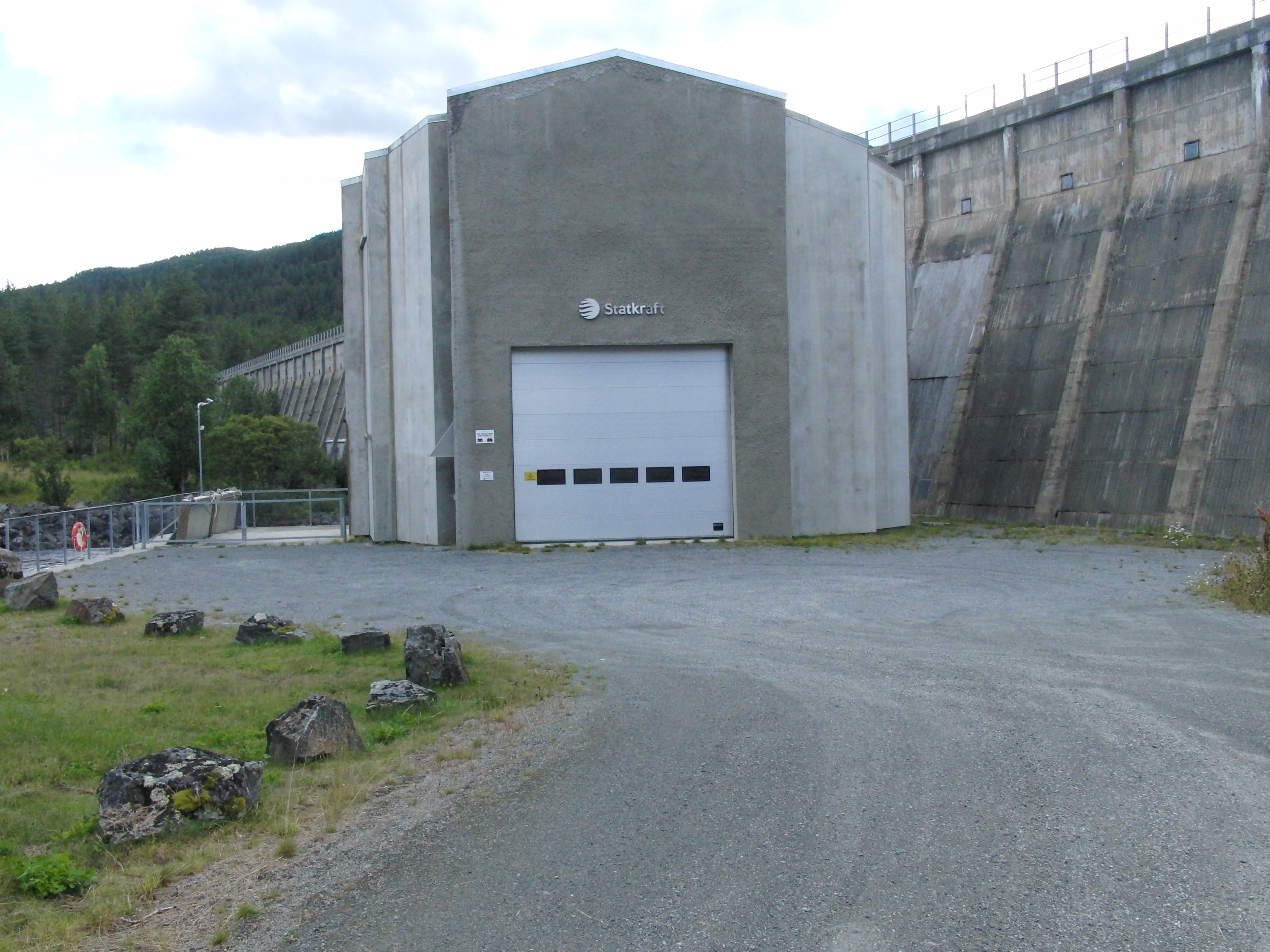 Pålsbu kraftverk